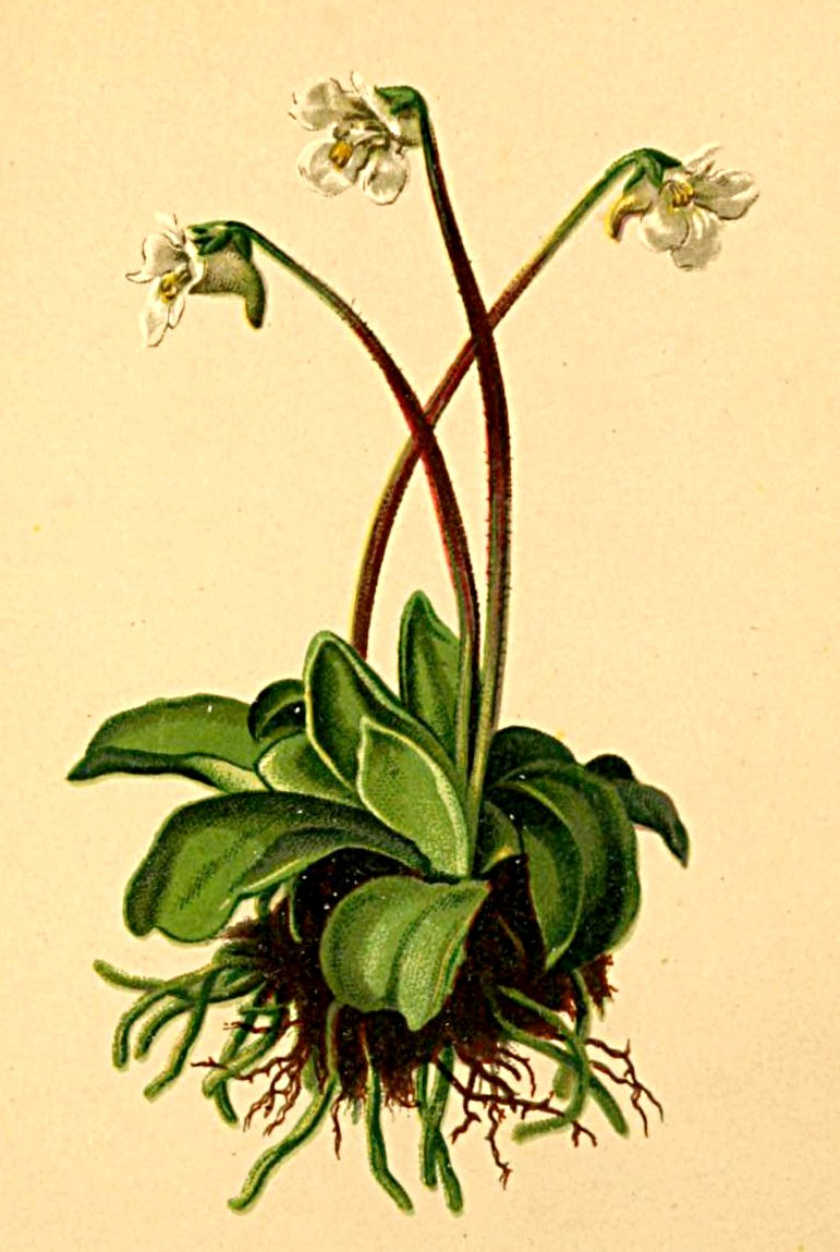 Pinguicula flavescens (Pinguicula alpina)